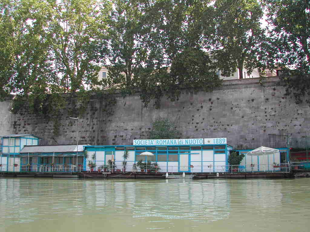 Roma, sul Tevere: il barcone della Società Romana di Nuoto (since 1889)